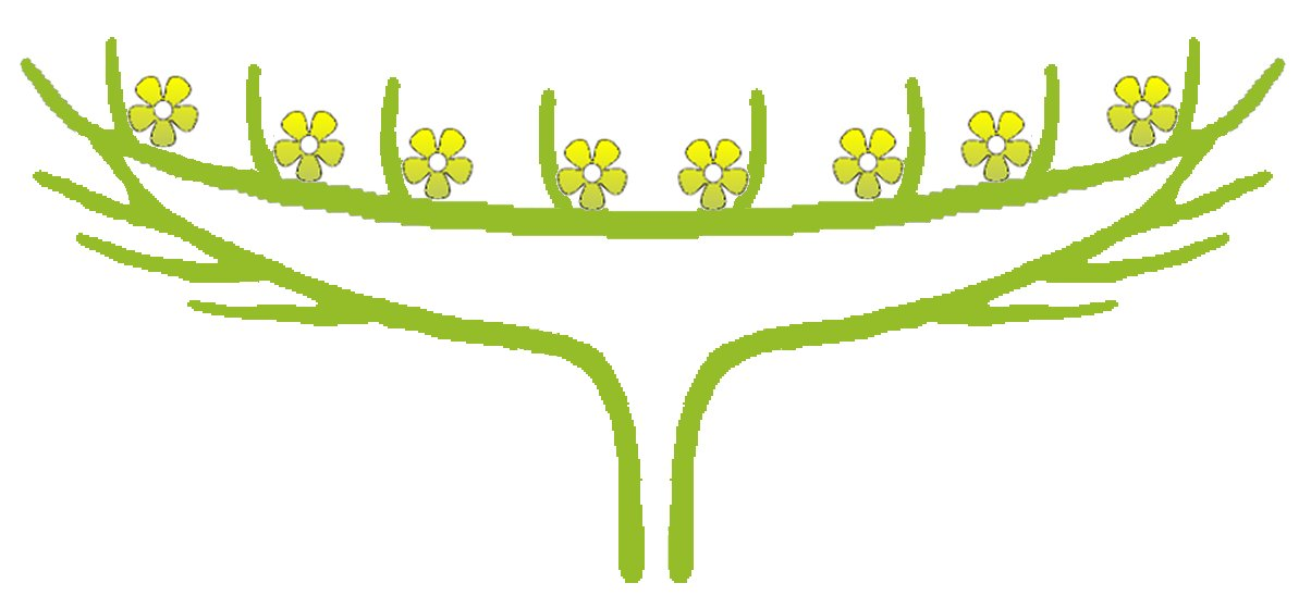 (hoofdje) head